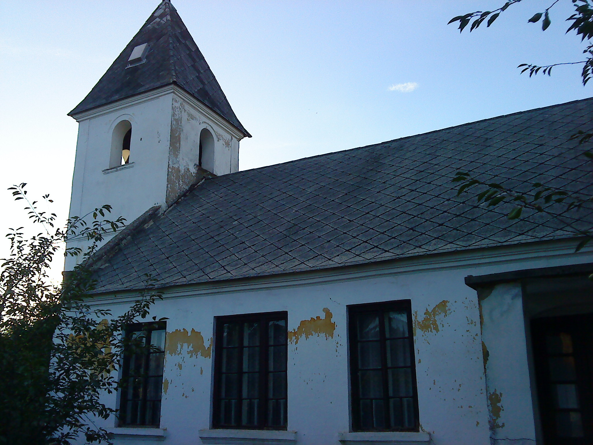 Iskolakápolna Szőkén